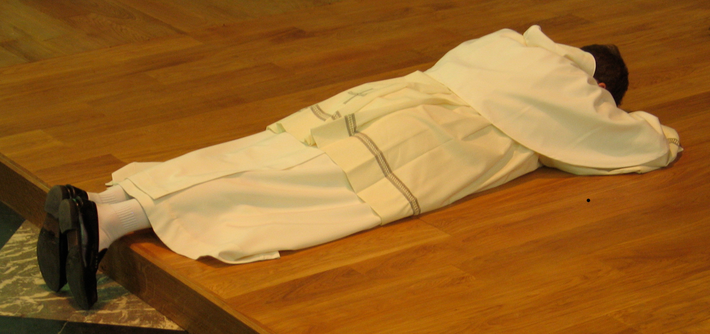 Profession solennelle d'un frère